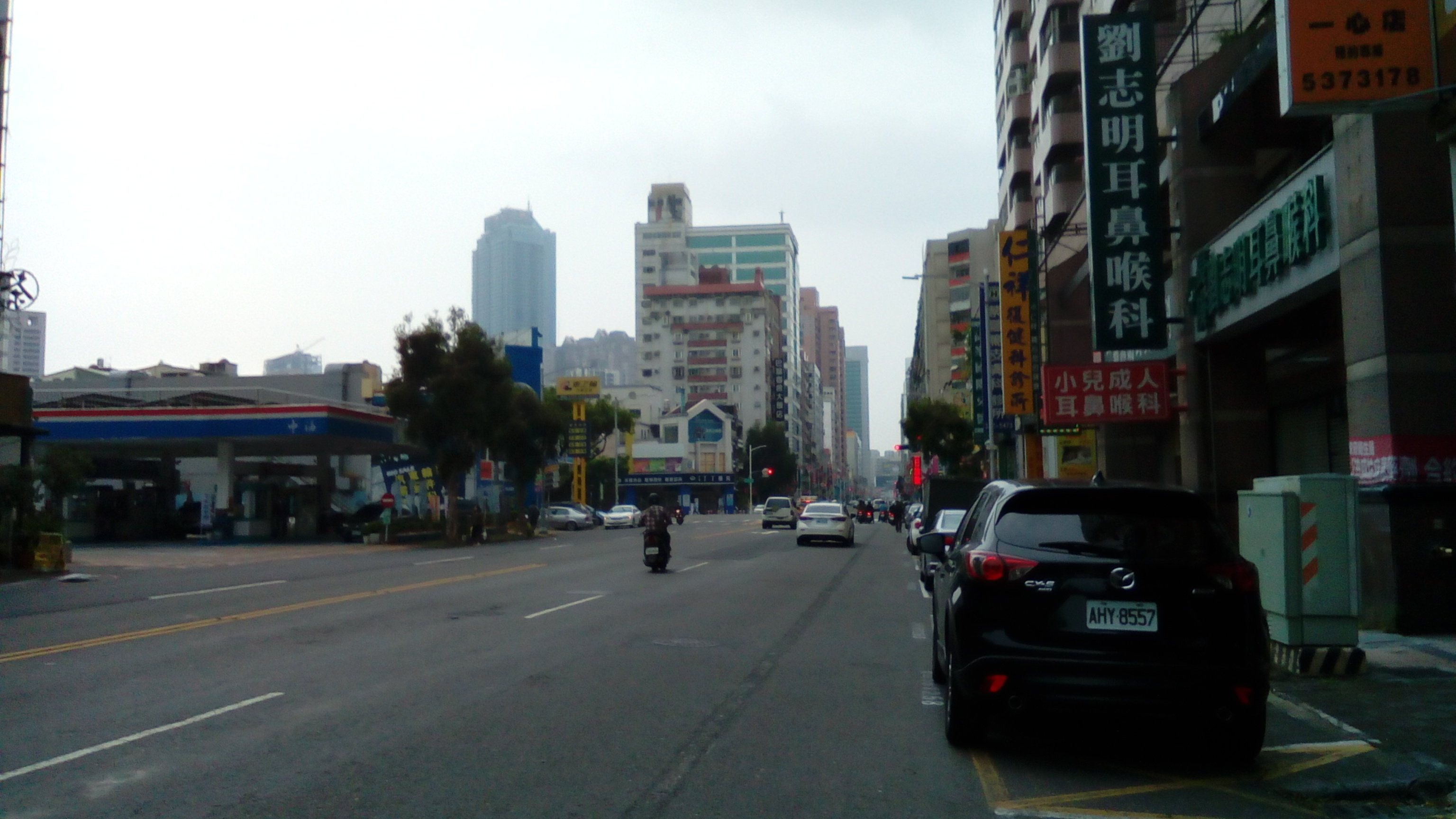 往市中心方向拍攝